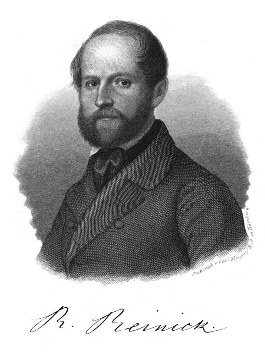 Robert Reinick, Stahlstich. In: Deutscher Musenalmanach, Würzburg 1853